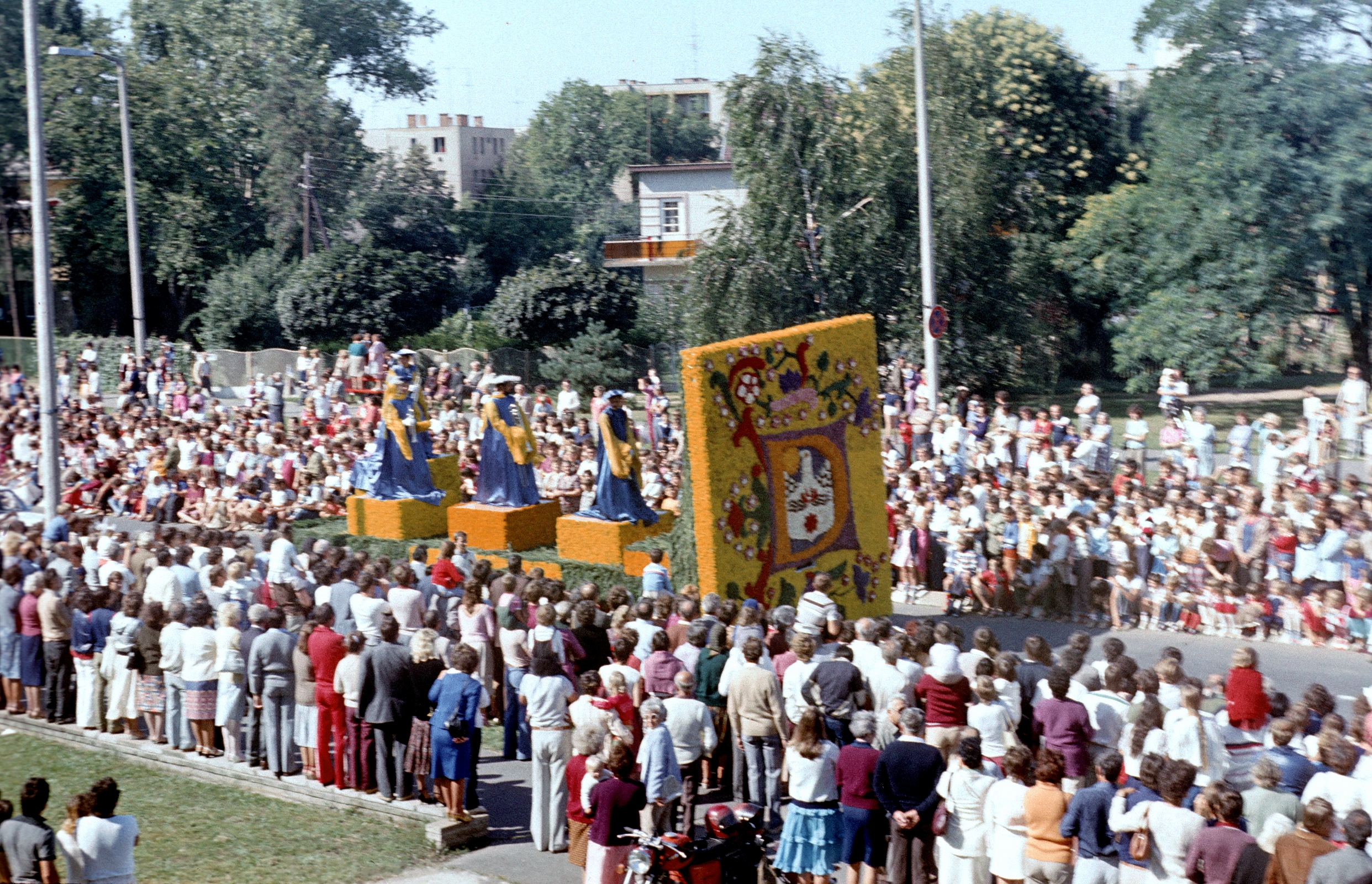 Праздник цветов в городе Дебрецен, август 1983 г.